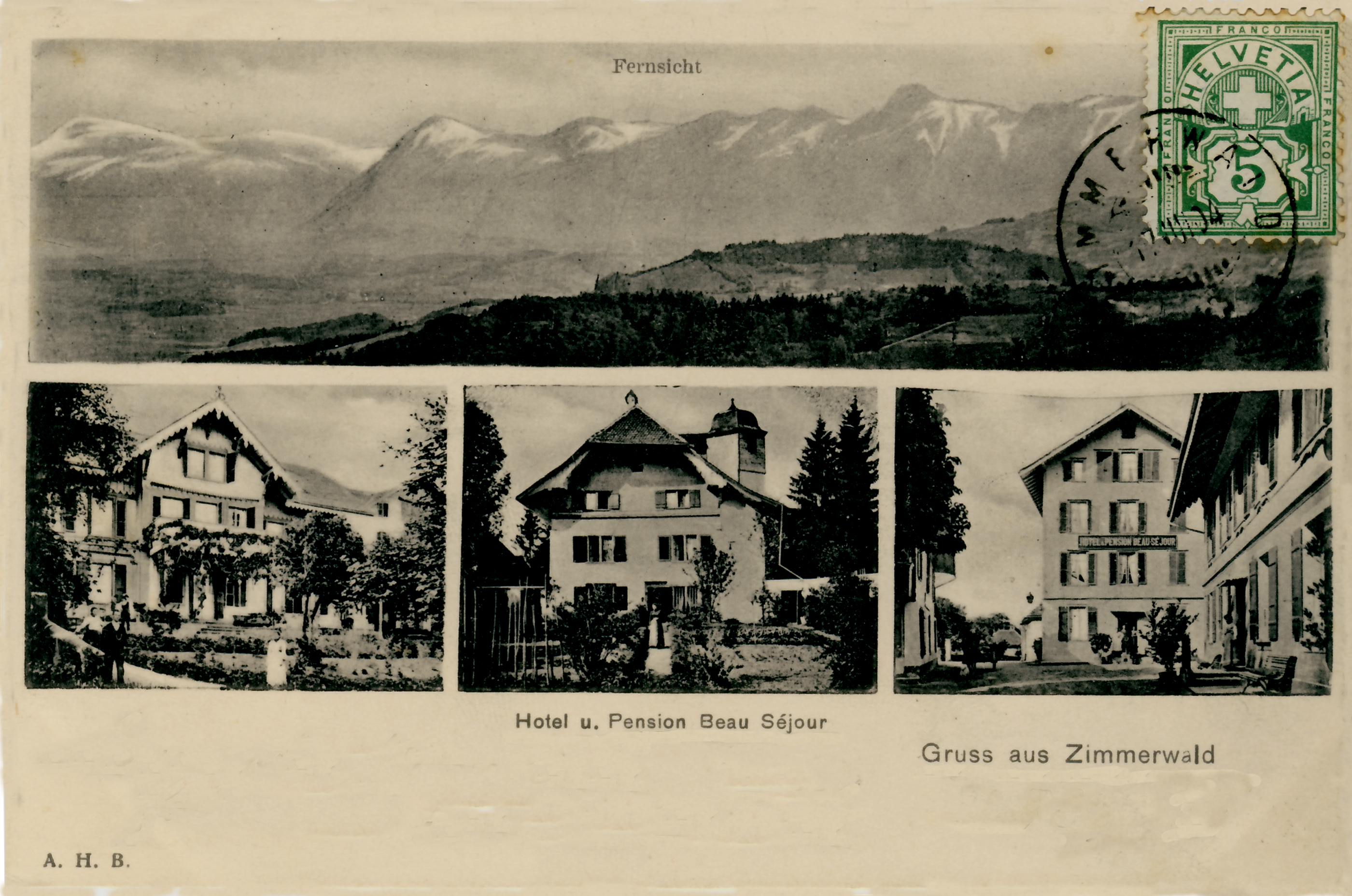 Postkarte aus Zimmerwald aus dem Jahr 1904 mit Werbung für die Pension Beau Séjour, Schauplatz der Konferenz von Zimmerwald